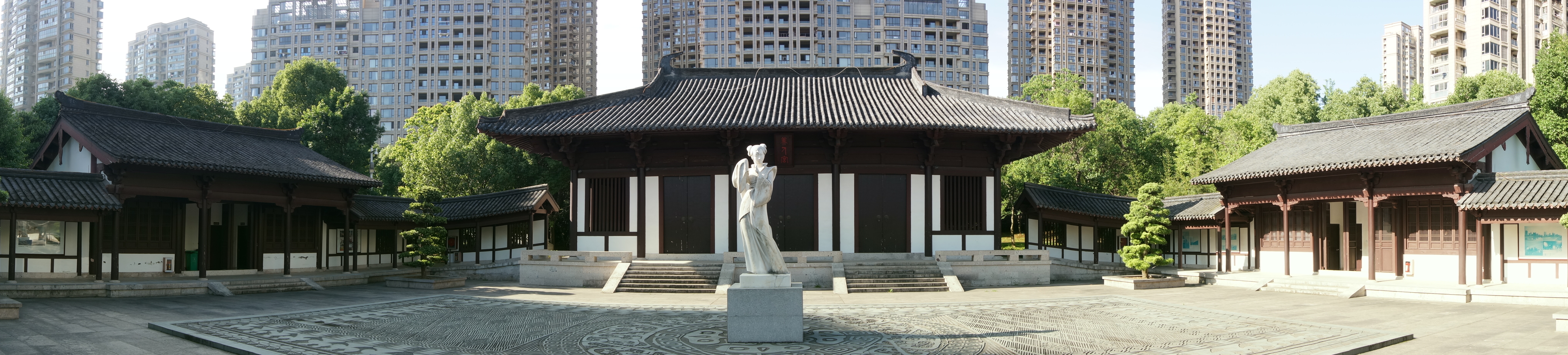 西施山遗址，美人宫大殿、配殿、院落及西施像（新建）全景。